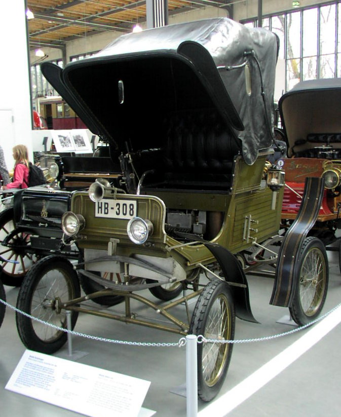 Mobile Steamer (1900)